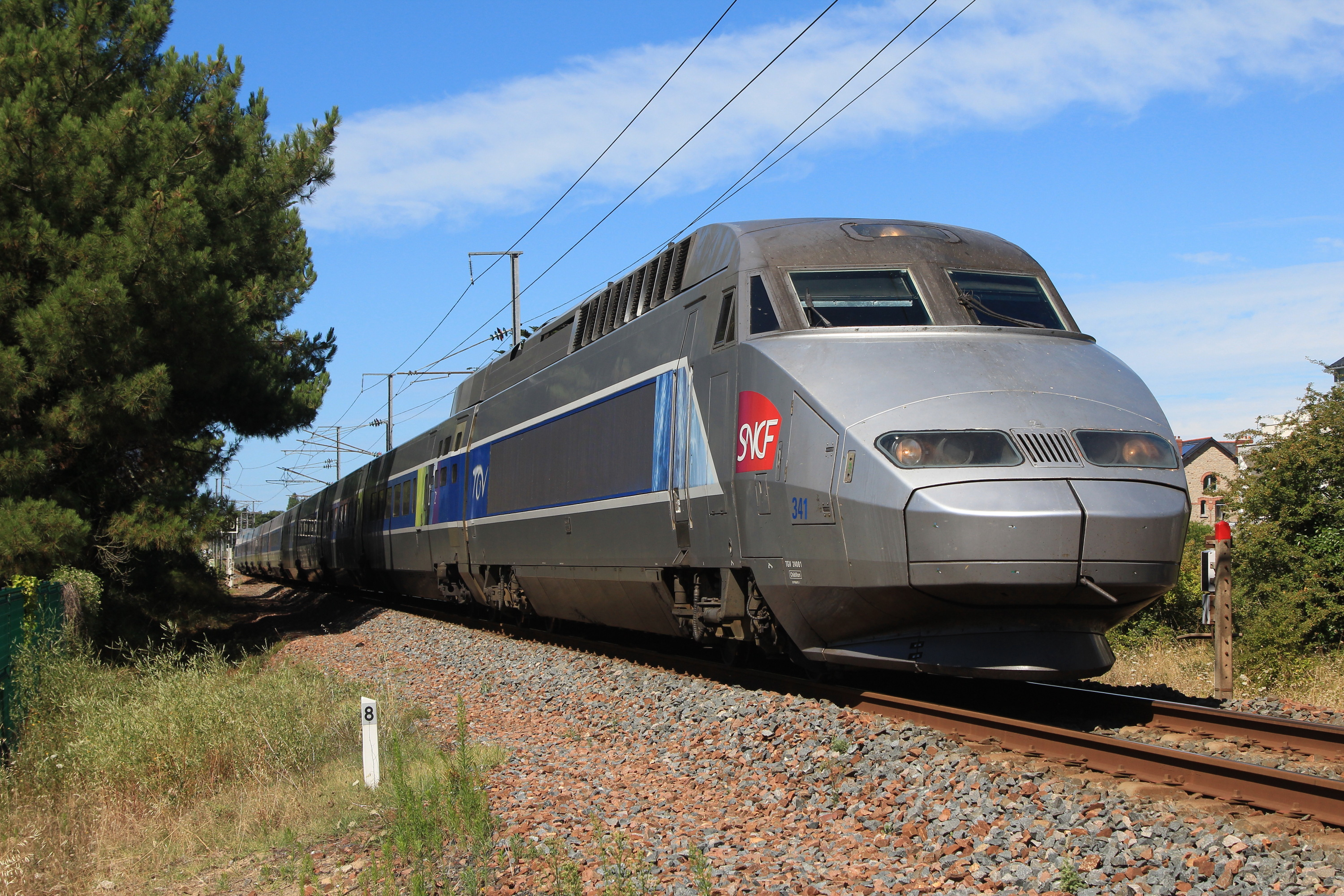 La rame TGV Atlantique n°341 assurant le TGV n°8932 (Le Croisic - Paris) repartant de la gare de La Baule-Escoublac, au PN piétons n°401 bis.